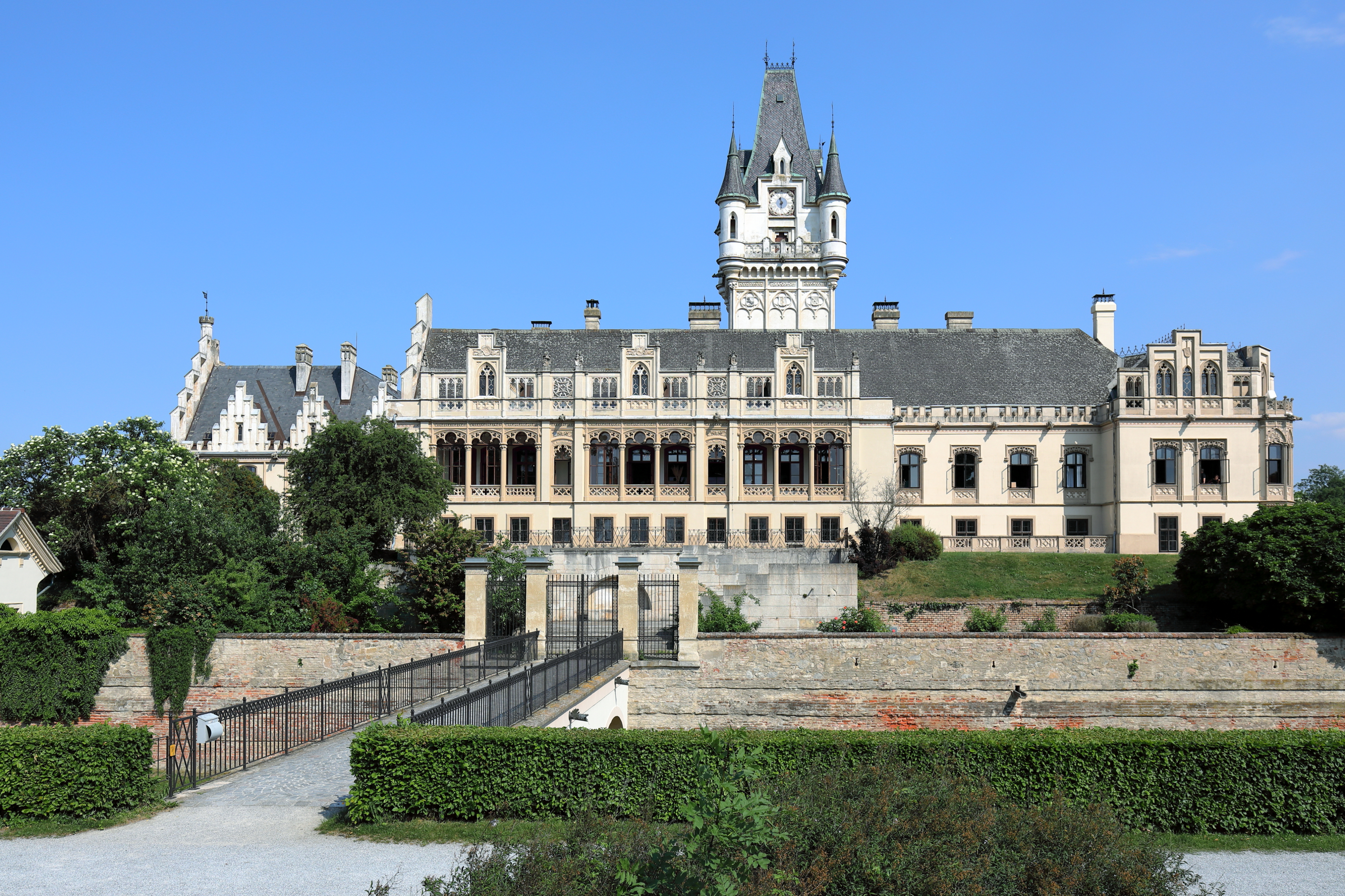 Der Westtrakt des Schlosses Grafenegg in der niederösterreichischen Marktgemeinde Grafenegg. Urkundlich 1294 als Festes Haus mit Mauer und Graben aufscheinend, wurde die Anlage 1645 im Zuge des Dreißigjährigen Krieges durch die Schweden gestürmt. Anschließend erfolgte die Wiederinstandsetzung und der Ausbau zu einer Vierflügelanlage. Von 1845 bis 1872 fand ein weiterer Aus- und Umbau zu einer romantisch-historistischen Schlossanlage statt und das Schloss erhielt dabei im Wesentlichen sein heutiges Erscheinungsbild. Die schweren Schäden infolge von Kriegs- und Nachkriegsereignissen wurden durch eine Restauration und Wiederinstandsetzung ab 1967 behoben.